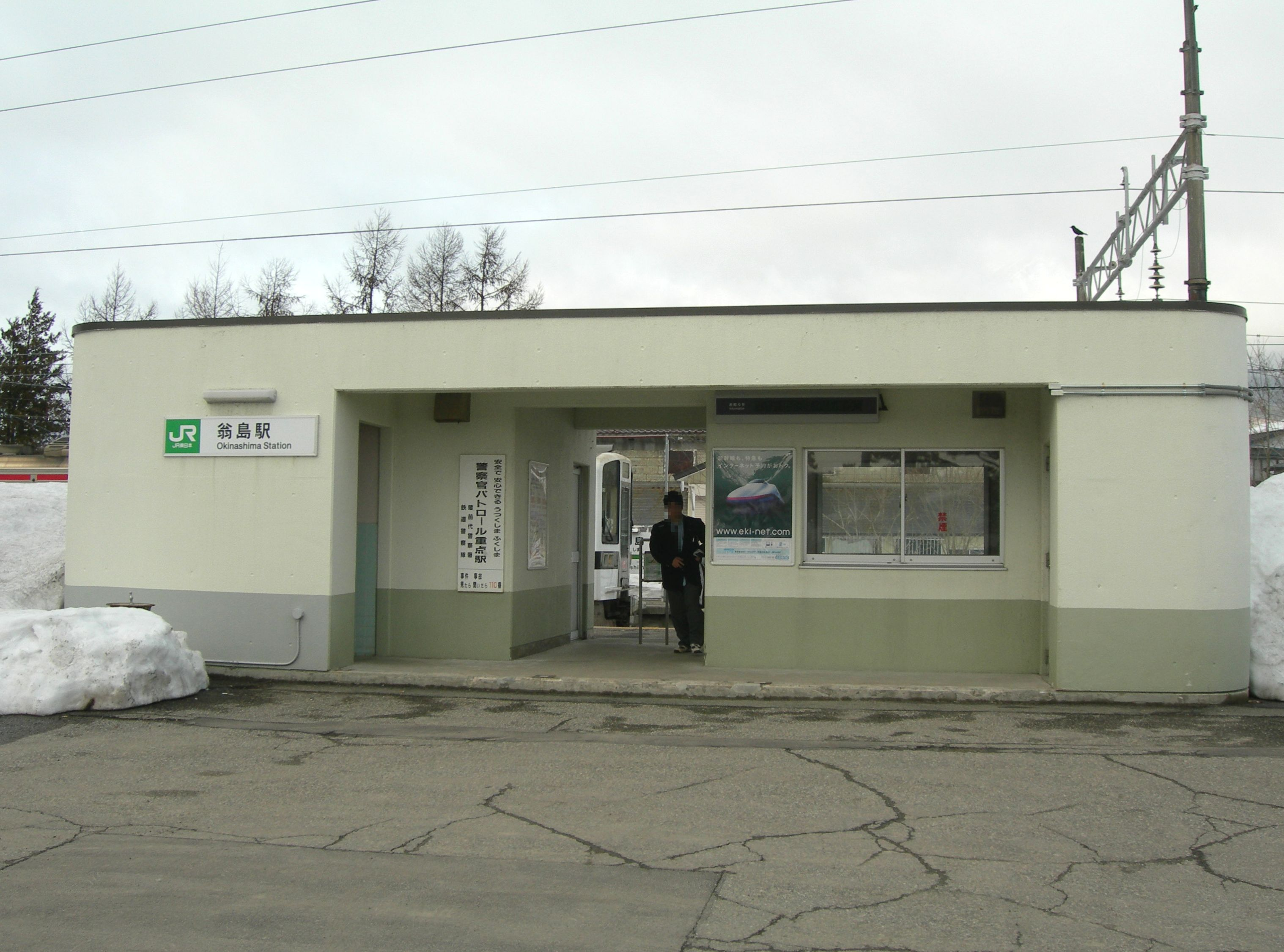 翁島駅駅舎